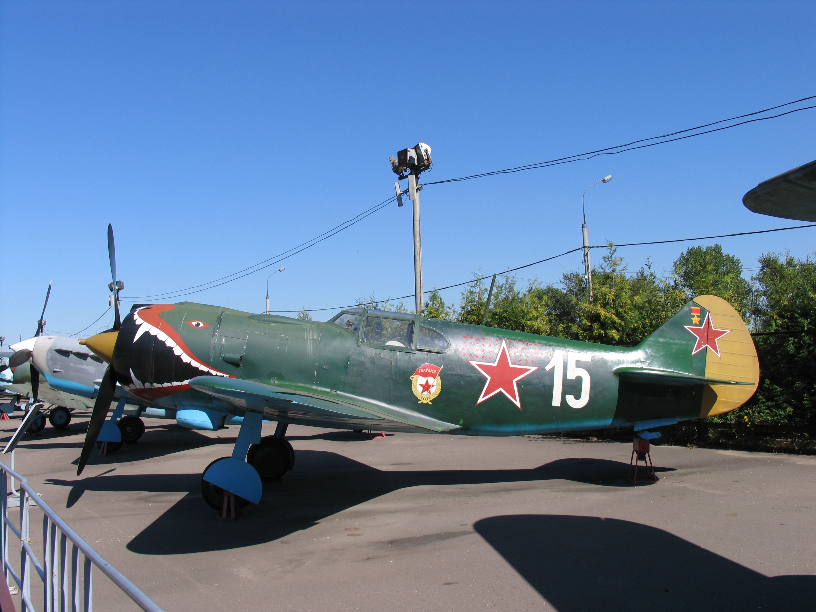 Lavochkin La-5